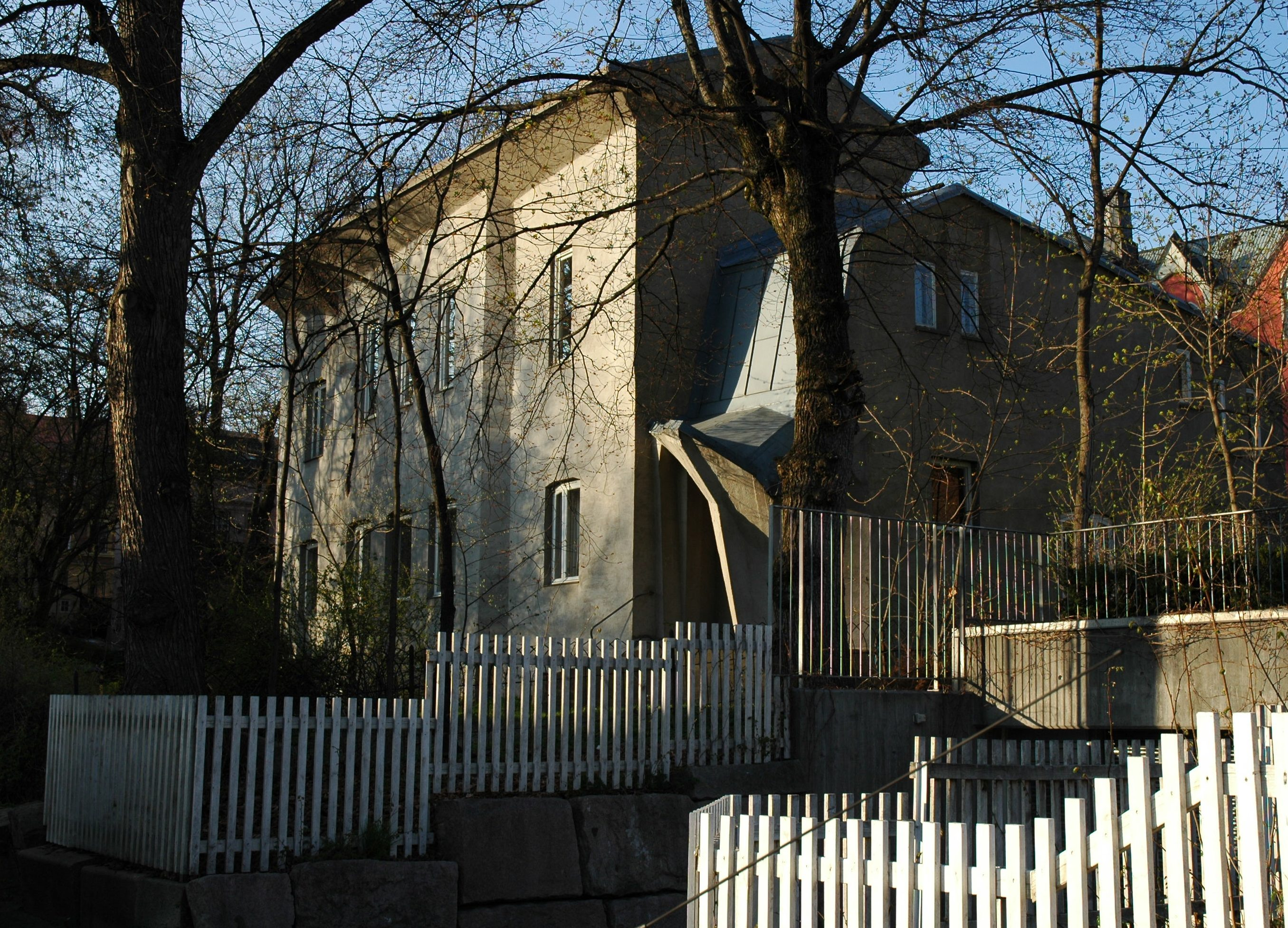 Antropos forlag og bokhandel i Josefinesgt 12 i Oslo. Oppført som villa i 1872 ved arkitekt Niels Stockfleth Darre Eckhoff.